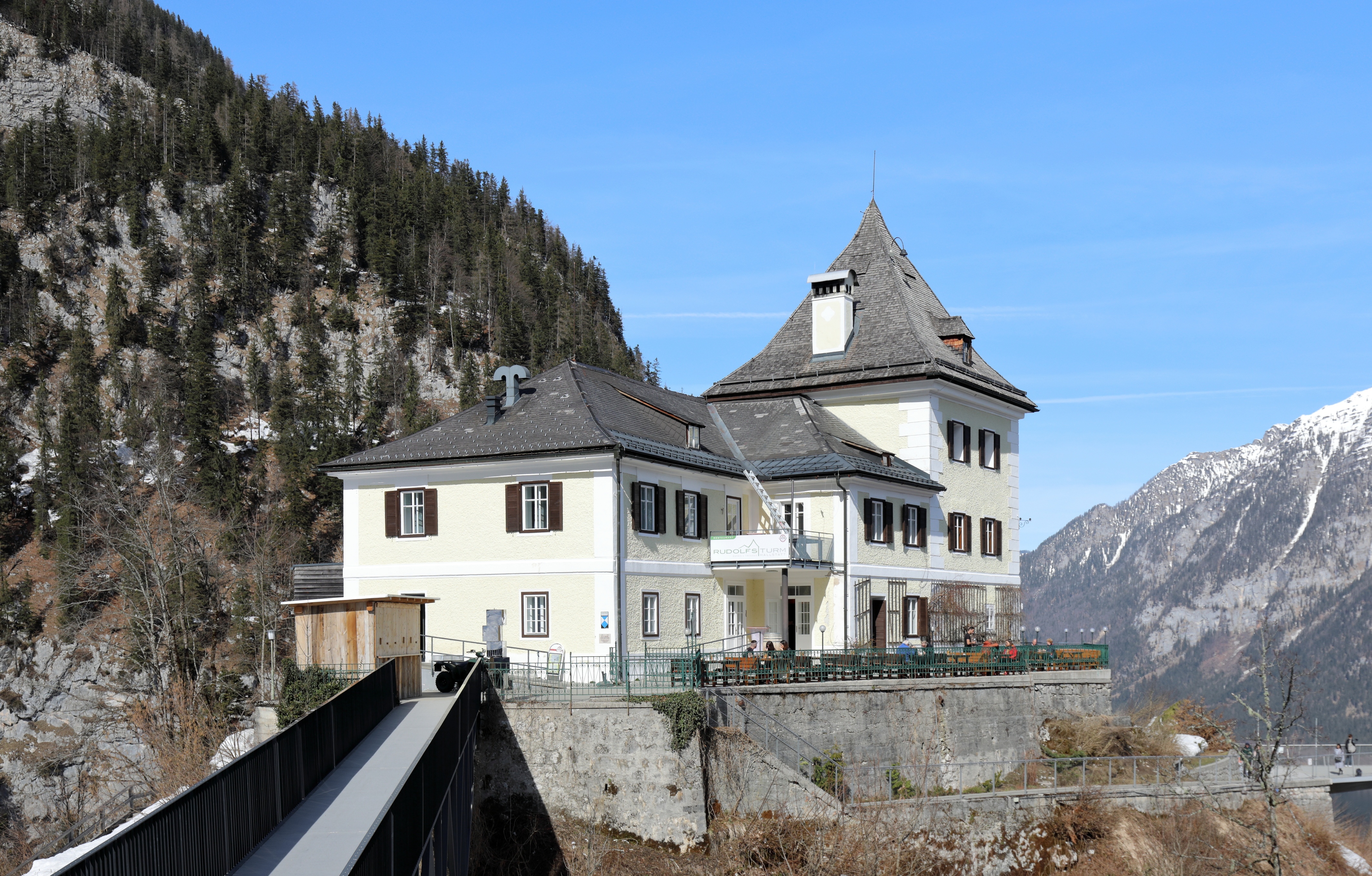 Südansicht des Rudolfsturms am Salzberg in der oberösterreichischen Marktgemeinde Hallstatt und rechts unten ein Teil der 2013 errichteten Aussichtsplattform „Welterbeblick“.Ursprünglich ein mittelalterlicher Wehrturm am Eingang des Hallstätter Salzberg-Hochtals. Von dieser Zeit bis 1954 wurde der Turm als Wohnung des jeweiligen Bergbaubetriebsleiters permanent genutzt.